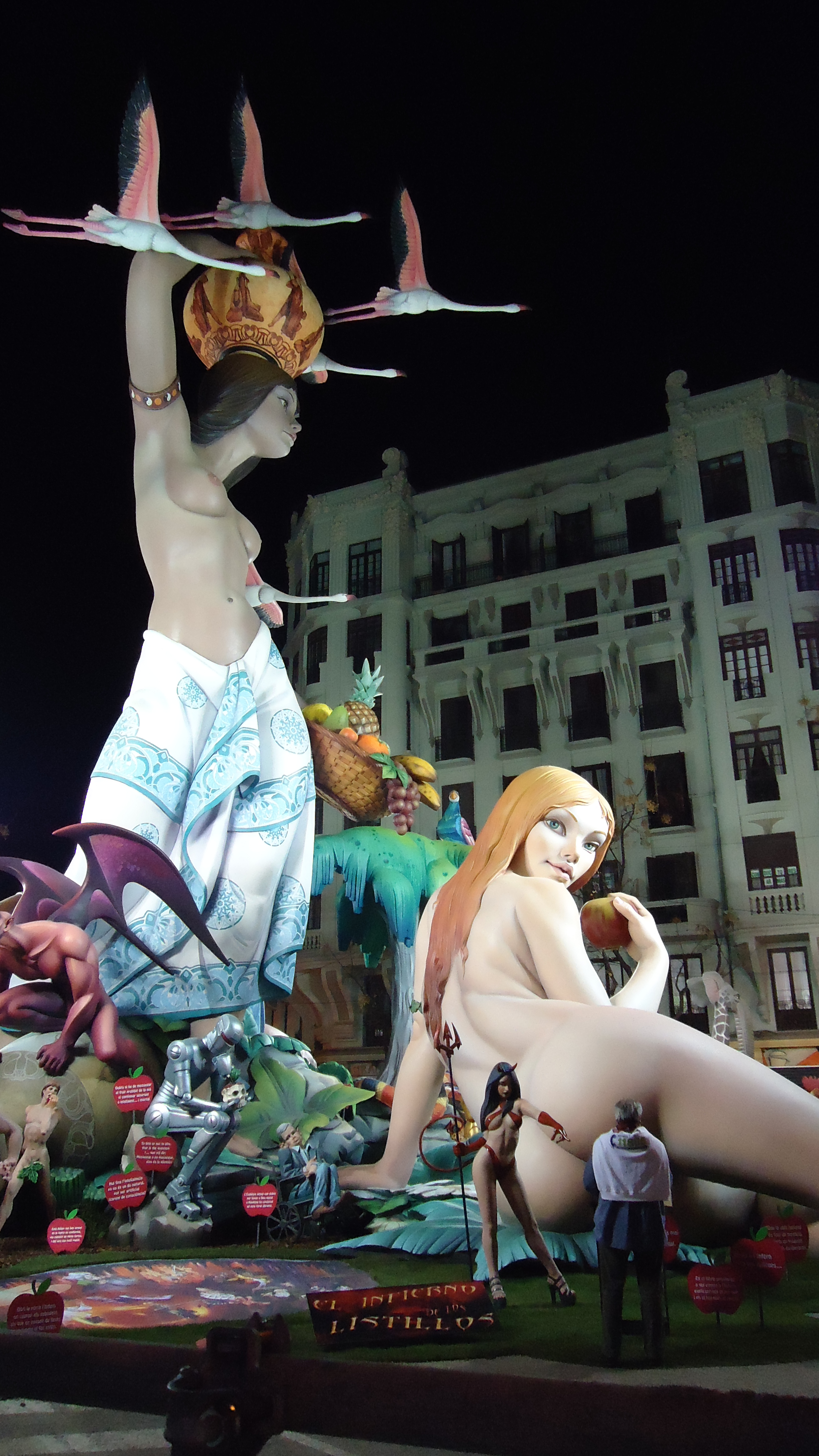 Fallas 2011 Valencia, falla Conde Altea-Almirante Cadalso